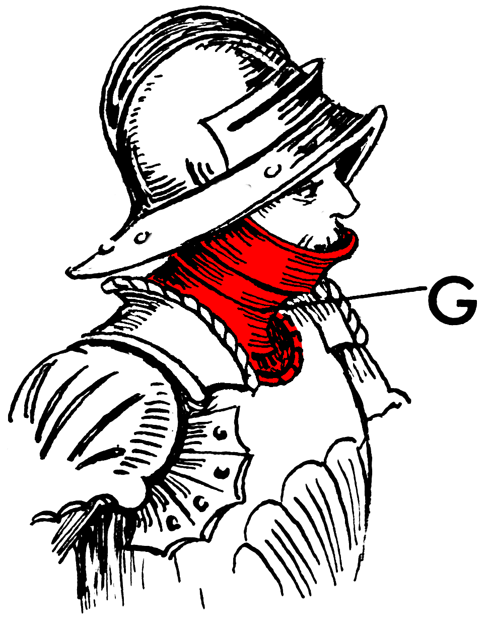 Gorget